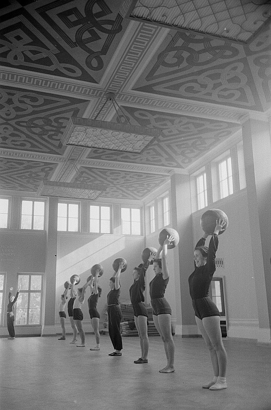 Original image description from the Deutsche FotothekSportlerinnen während einer Übung mit einem Medizinball in einer Sporthalle der Deutschen Hochschule für Körperkultur in Leipzig